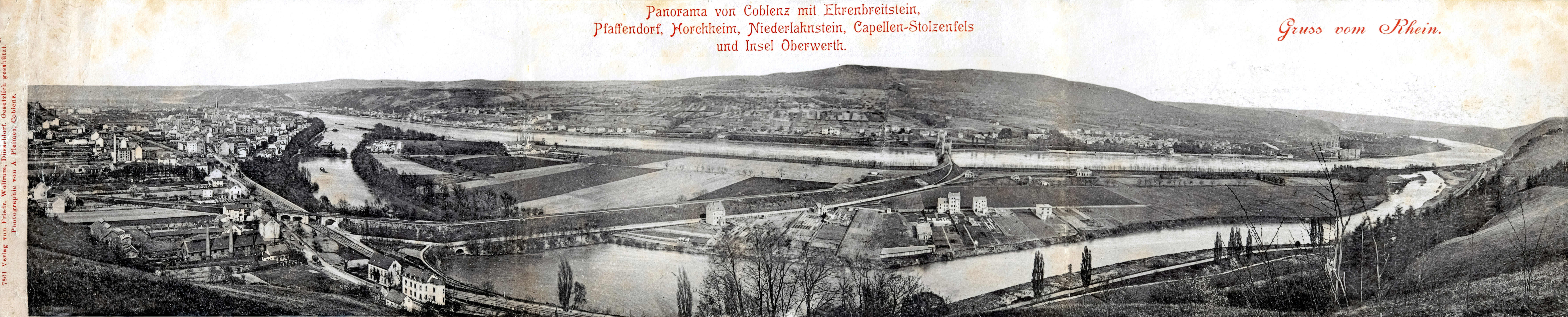 noramapostkarte vom Koblenzer Oberwerth mit Pfaffendorf, Horchheim und der Südstadt Koblenz